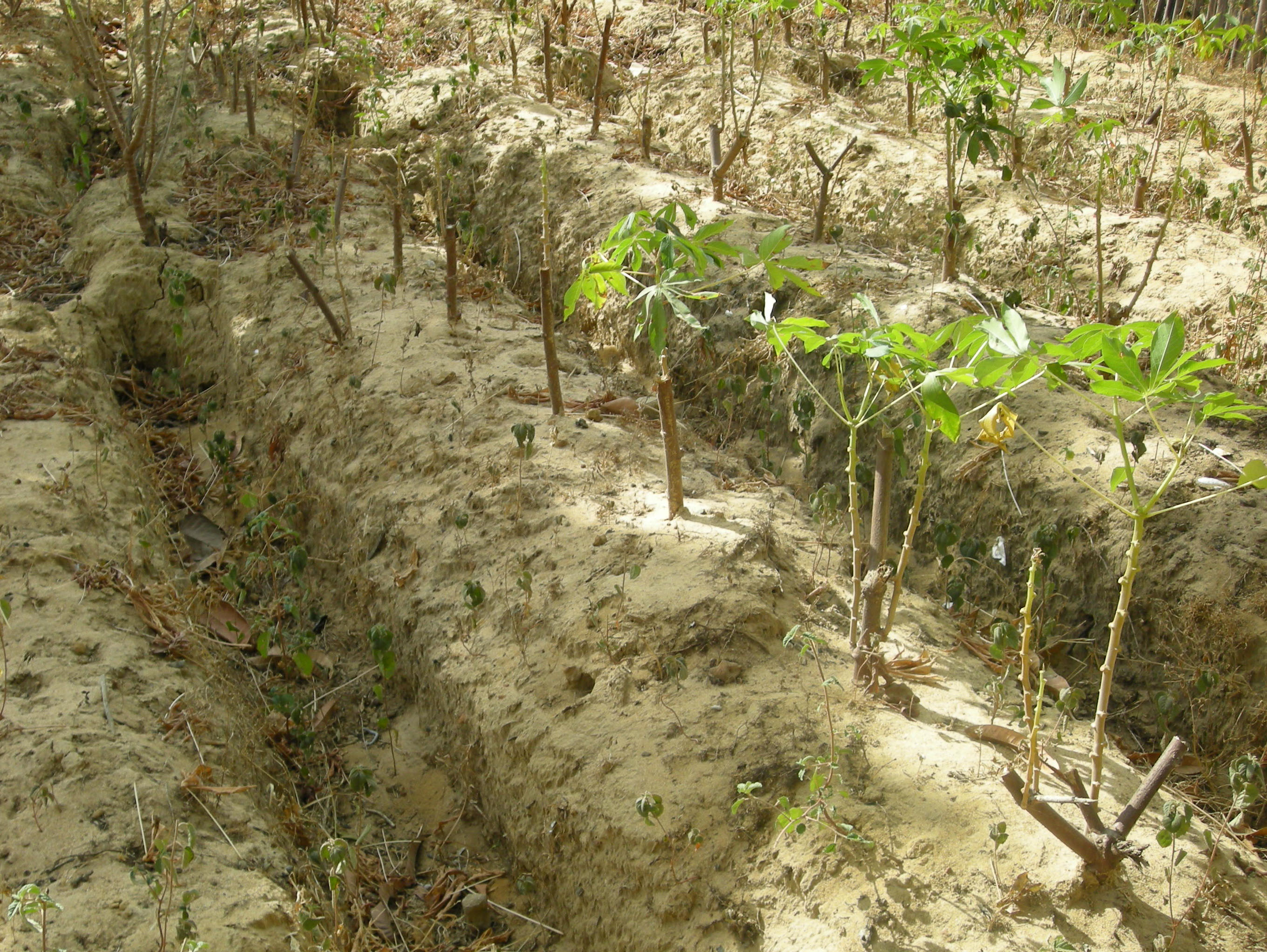 Culture familiale du manioc à Enampor (Casamance, Sénégal).